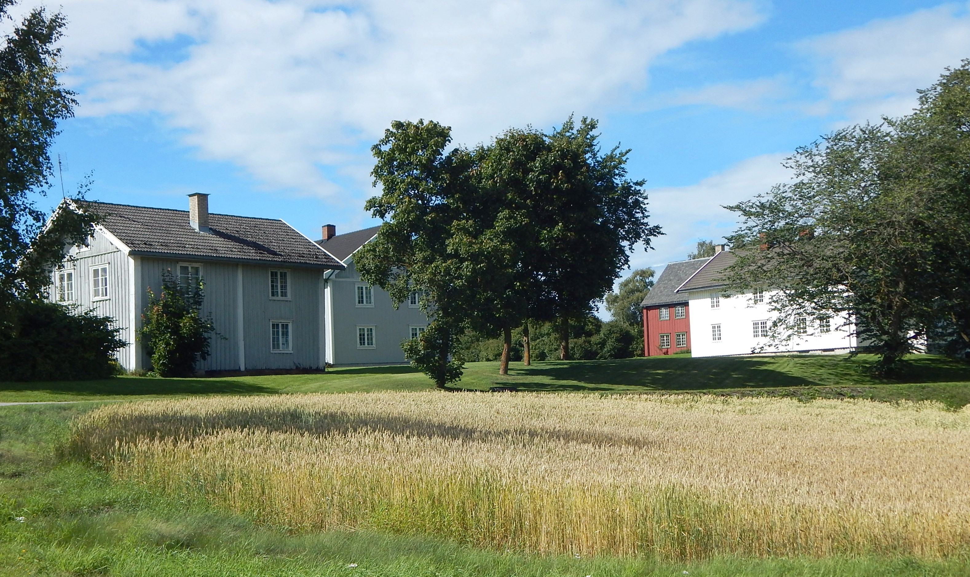 Bygninger på Arneberg søndre og østre i klyngetun